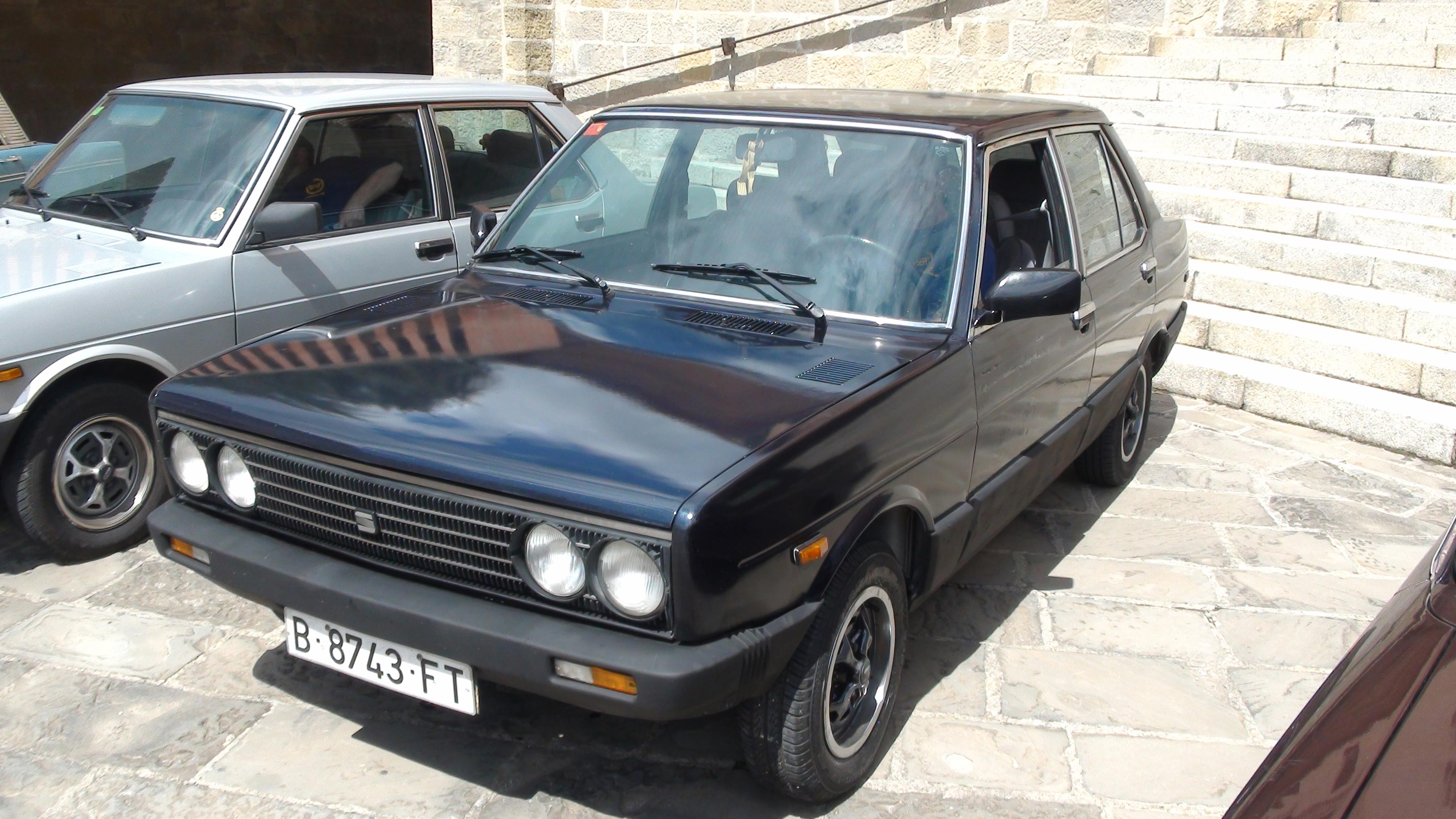 Coches clásicos en Torreciudad - 96